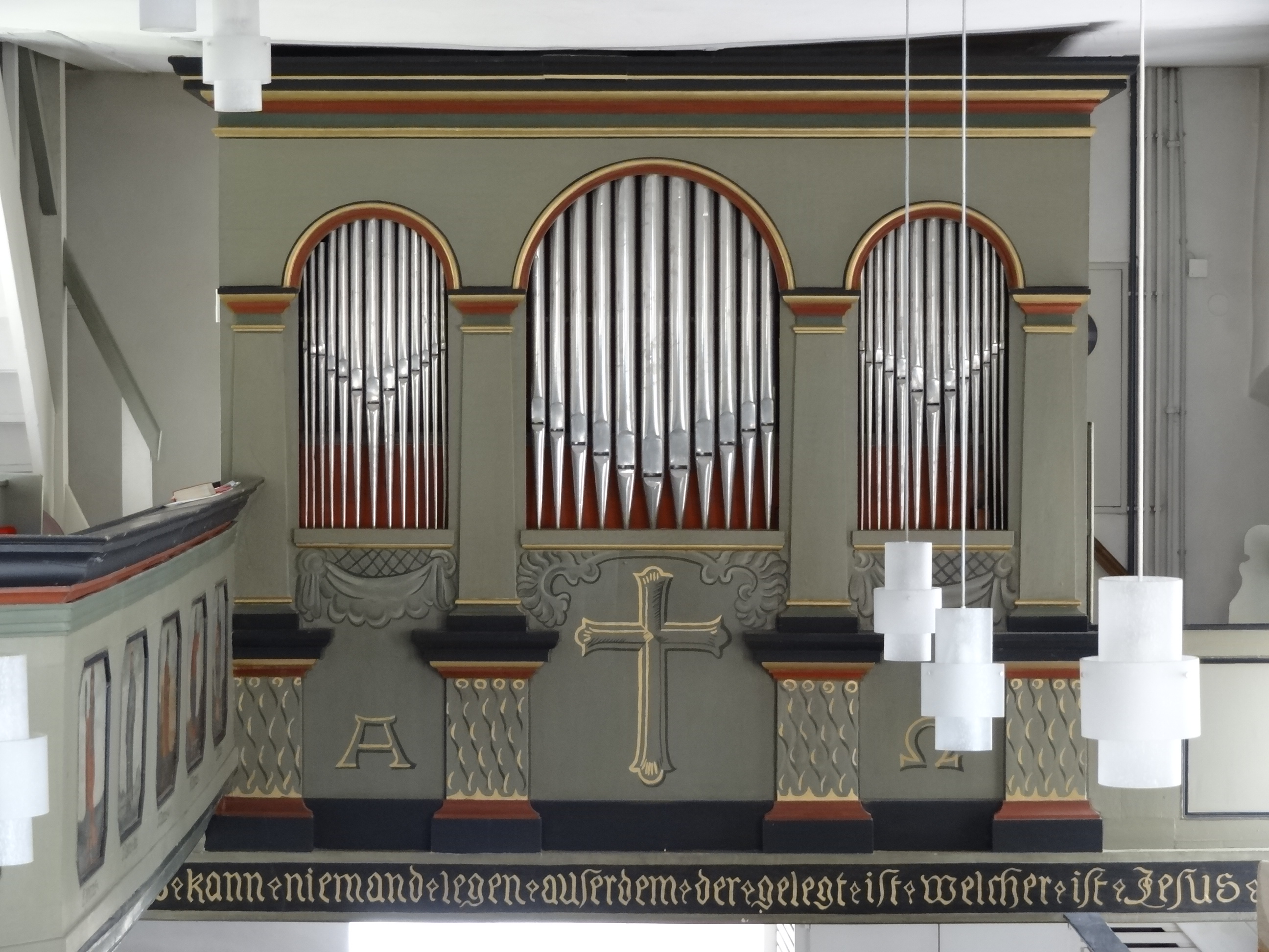 Evangelische Kirche Pohl-Göns